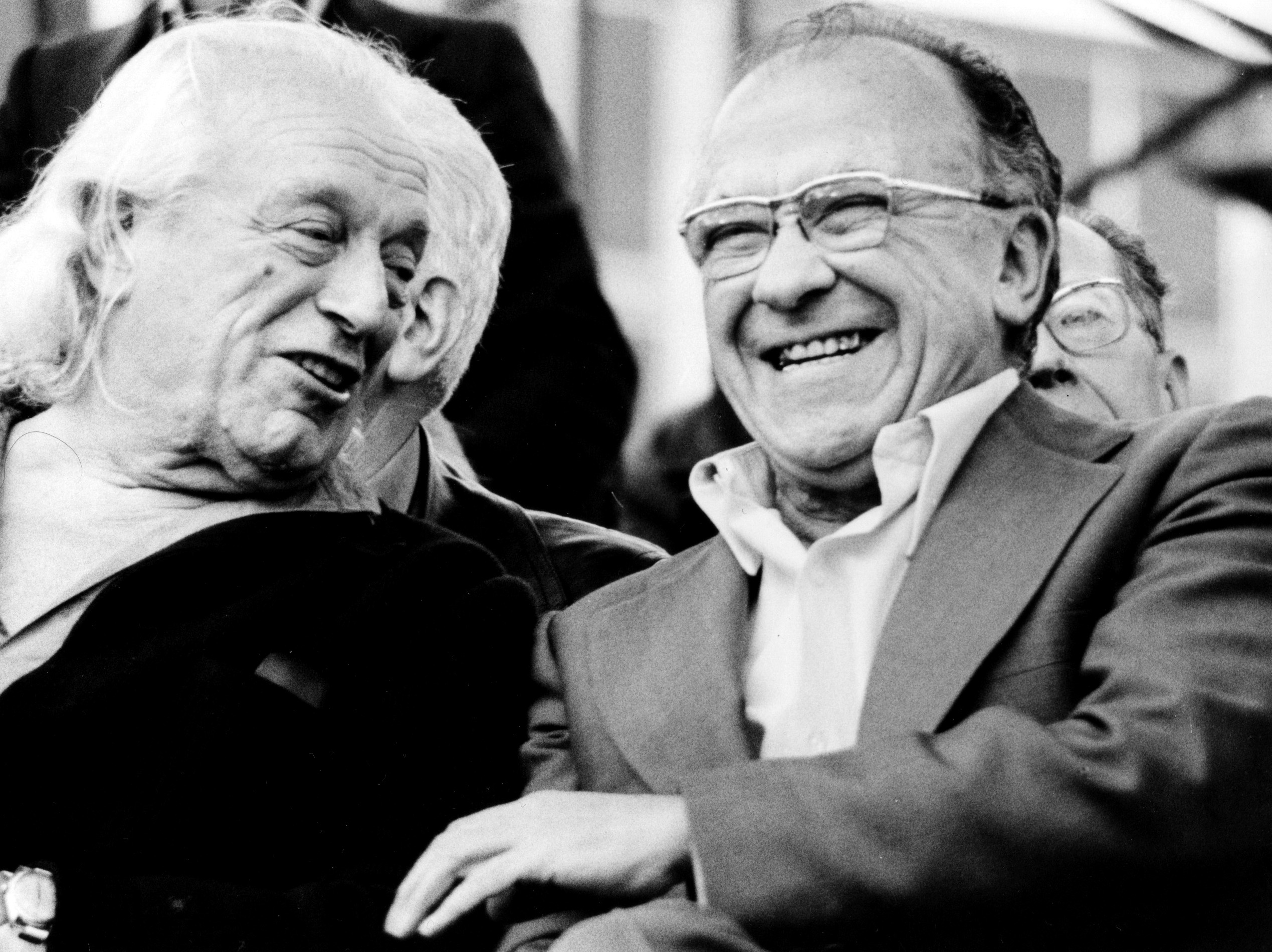 Rafael Alberti y Santiago Carrillo en la clausura de la 1ª fiesta del PCE en la Casa de Campo de Madrid. 1978